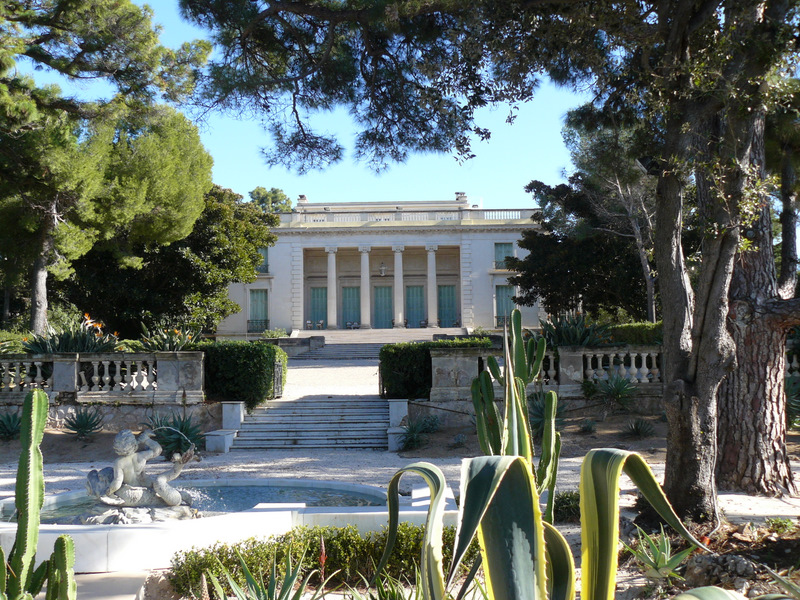 Villa Eilen Roc, cap d'Antibes, France